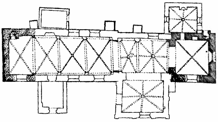 Plantegning Halk Kirke